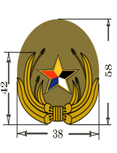 満州帝国陸軍・憲兵用帽章 康徳2年8月2日制定